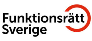 Logga